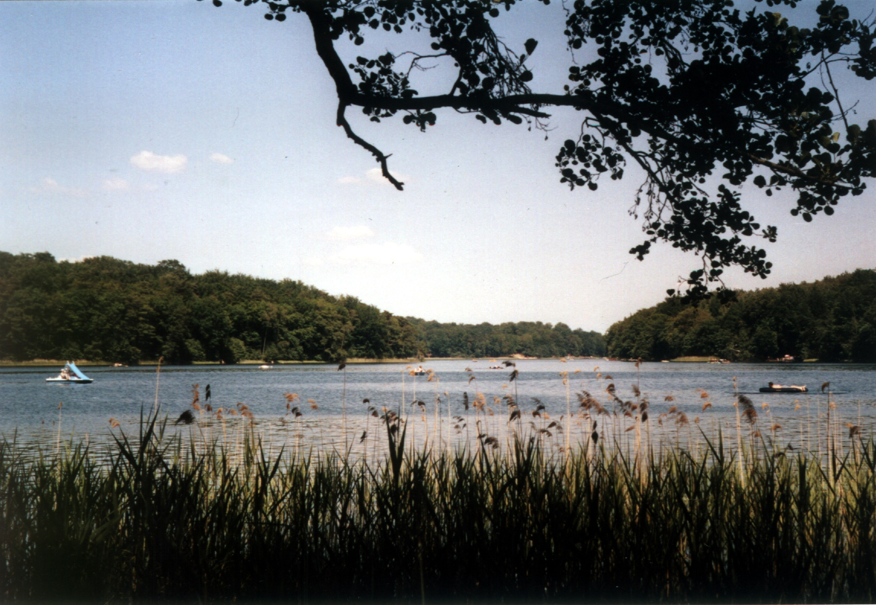 Der Liepnitzsee im August 2006